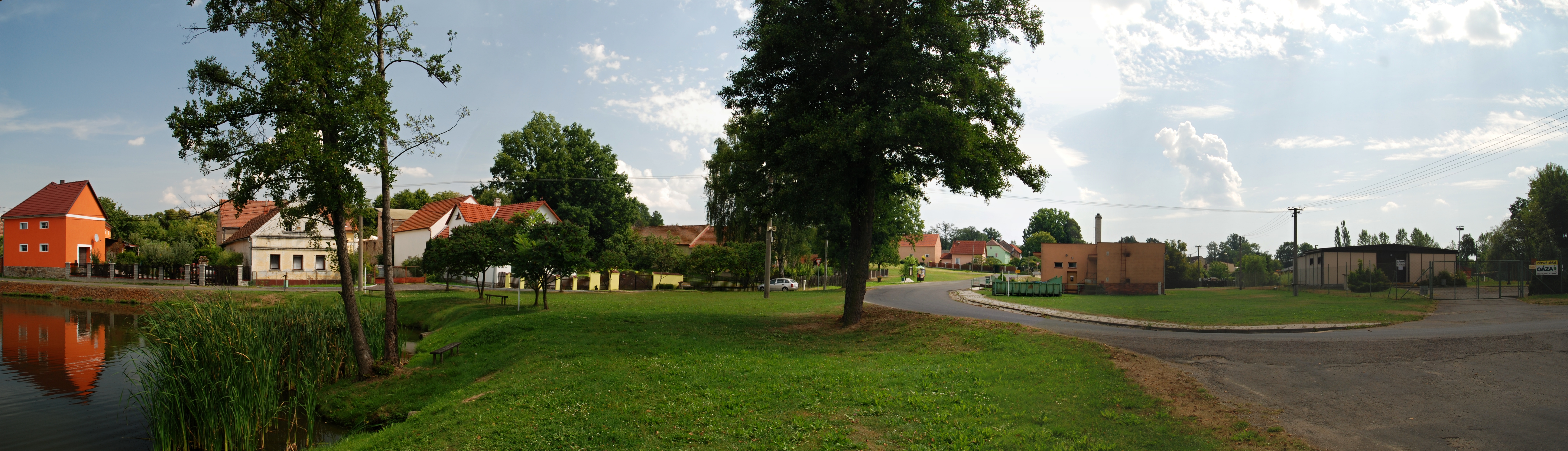 Pohled od rybníka směrem ke hlavní silnici